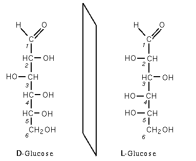 Énantiomères du glucose : formes D et L. Mars 2005 Création personnelle. Catégorie:Biochimie